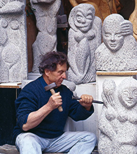 Shelomo Selinger sculpting in his studio